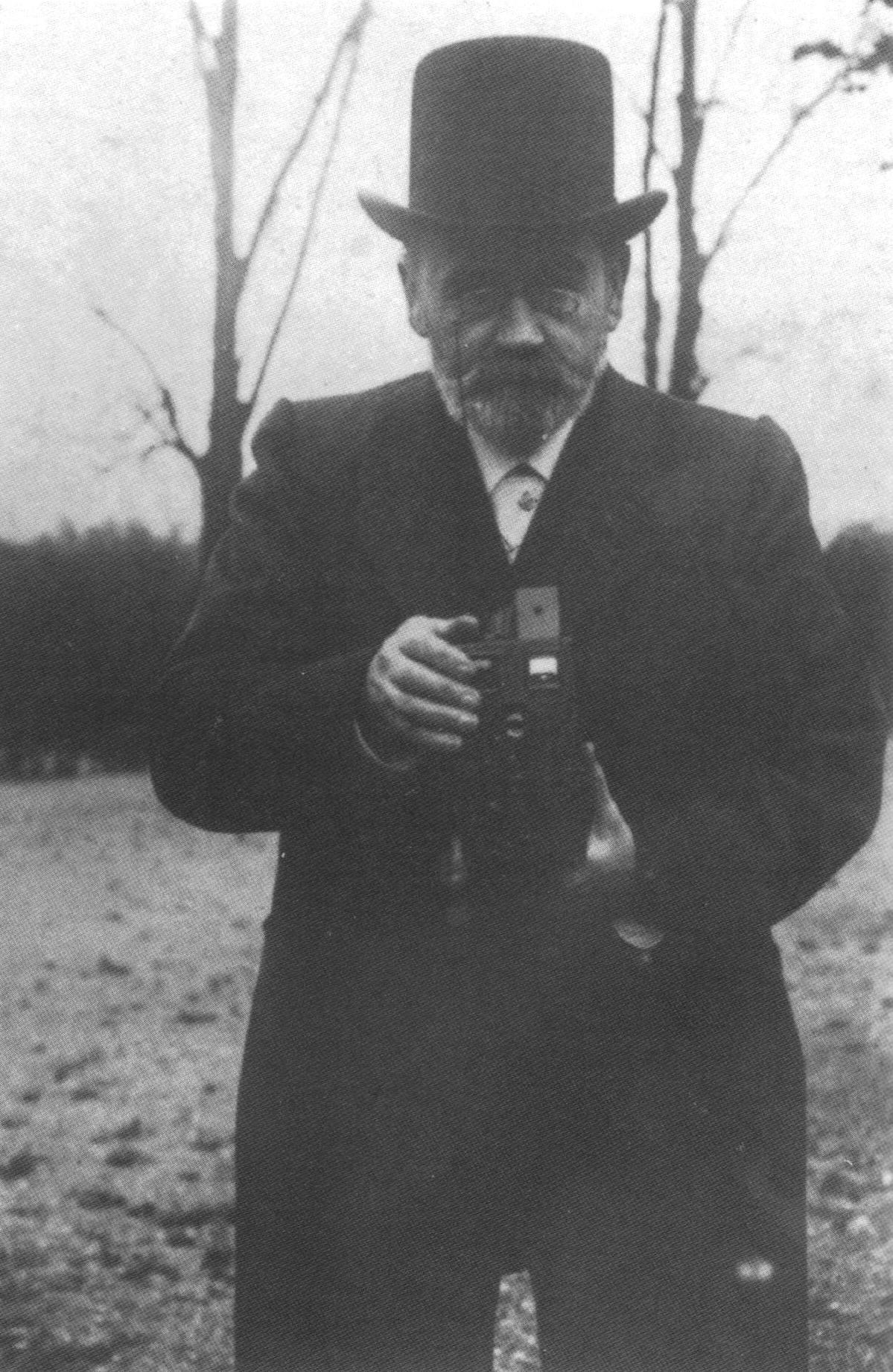 Zola photographe - ca 1900